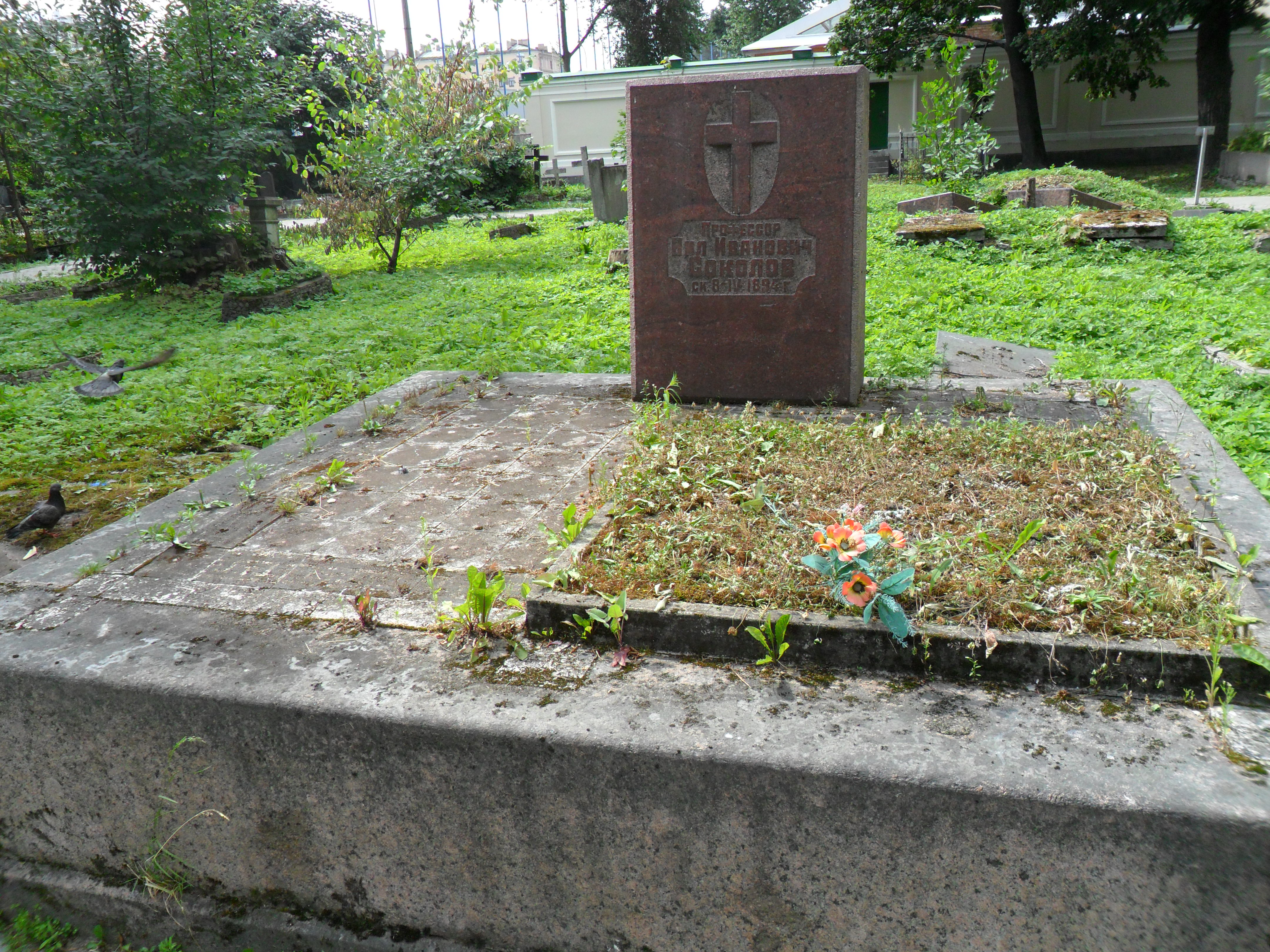 Могила профессора медицины Нила Ивановича Соколова на кладбище Новодевичьего монастыря в Санкт-Петербурге